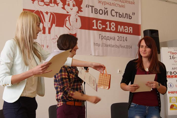 Беларуская (тарашкевіца): Фестываль журналістыкі, Гродна